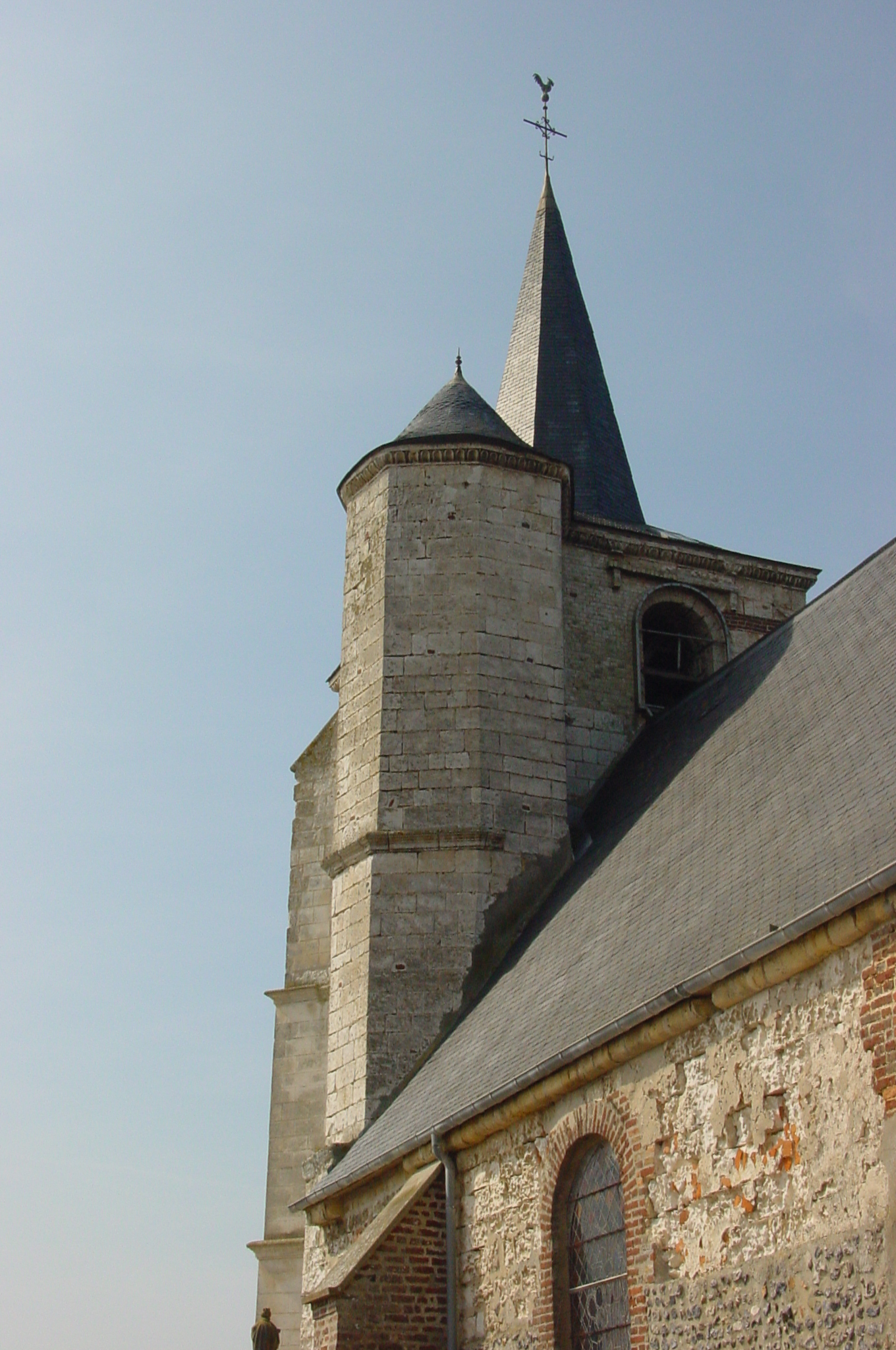 Clocher de l'église de Pendé (Somme, France)